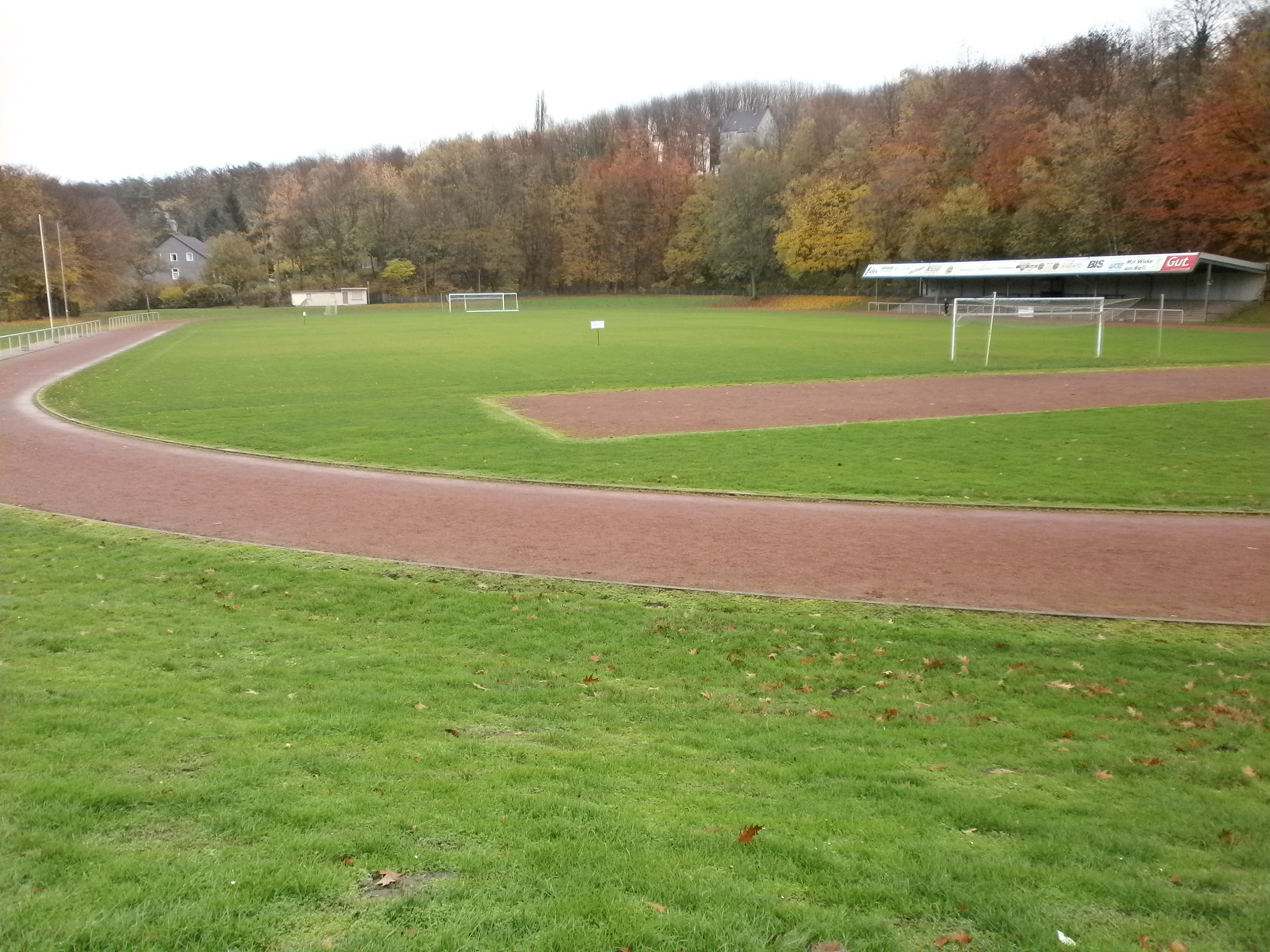 Sportanlage,Sportplatz Hasenwinkler Straße, die vom LDT Bochum mitgenutzt wird.